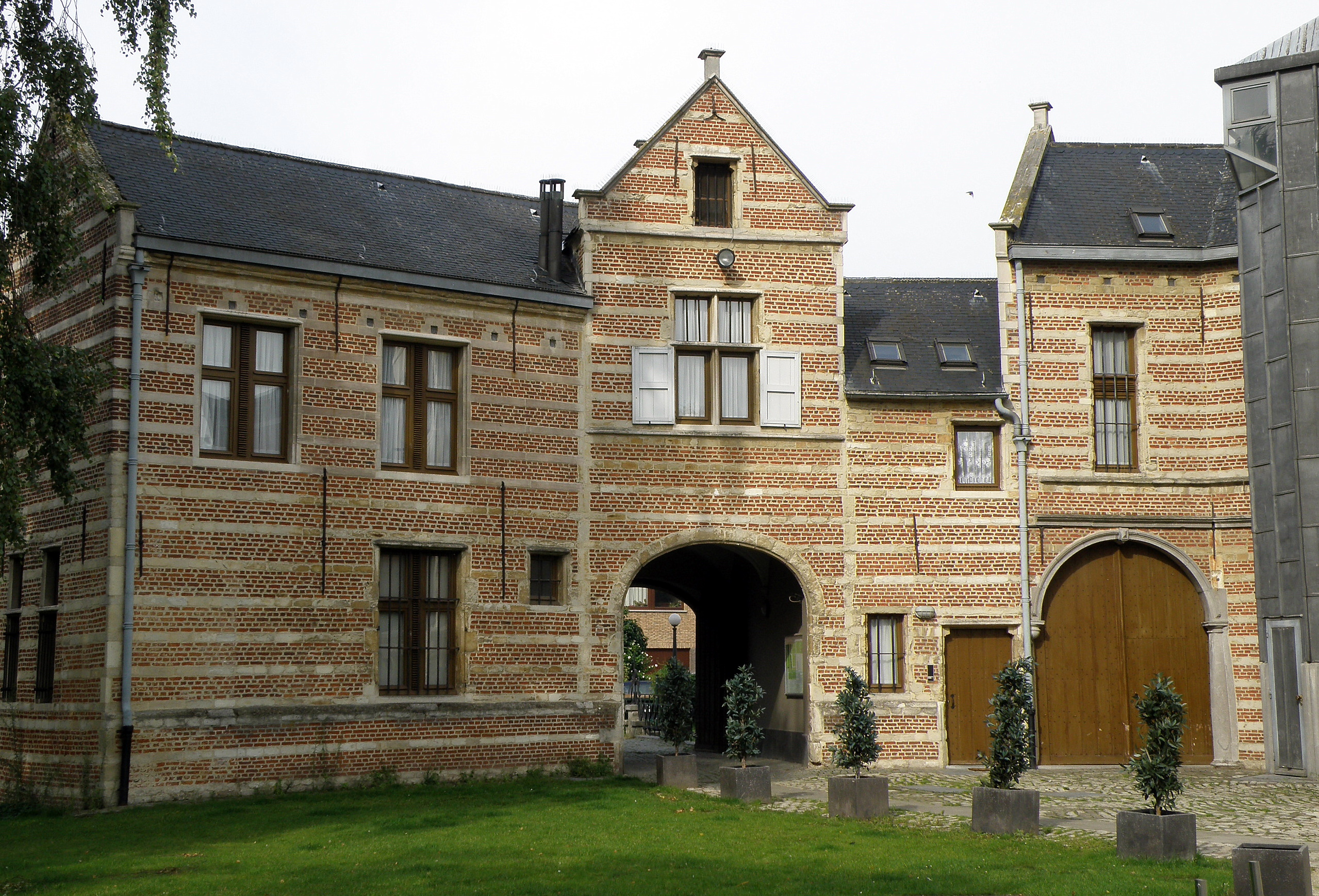 Anvers, Belgique. Château et manoir de plaisance dit Bisschoppenhof, complexe de bâtiments contigus, sis Suzanne Spanhovenstraat à Deurne-Nord, dans la banlieue nord-est d’Anvers, sur le bord d’un terrain circulaire arboré et entouré d’une douve. Le complexe comprend : une porterie du XVIe siècle, auquel donne accès un pont à arche ; attenant à celle-ci, sur son côté gauche, le corps de logis principal, daté du XVIIe, mais remanié (not. les baies et le perron) fin XIXe ; contigu à ce dernier, un autre corps de logis, extension datant du début XIXe. Photographie montrant la façade arrière (c.-à-d. est) de la porterie.